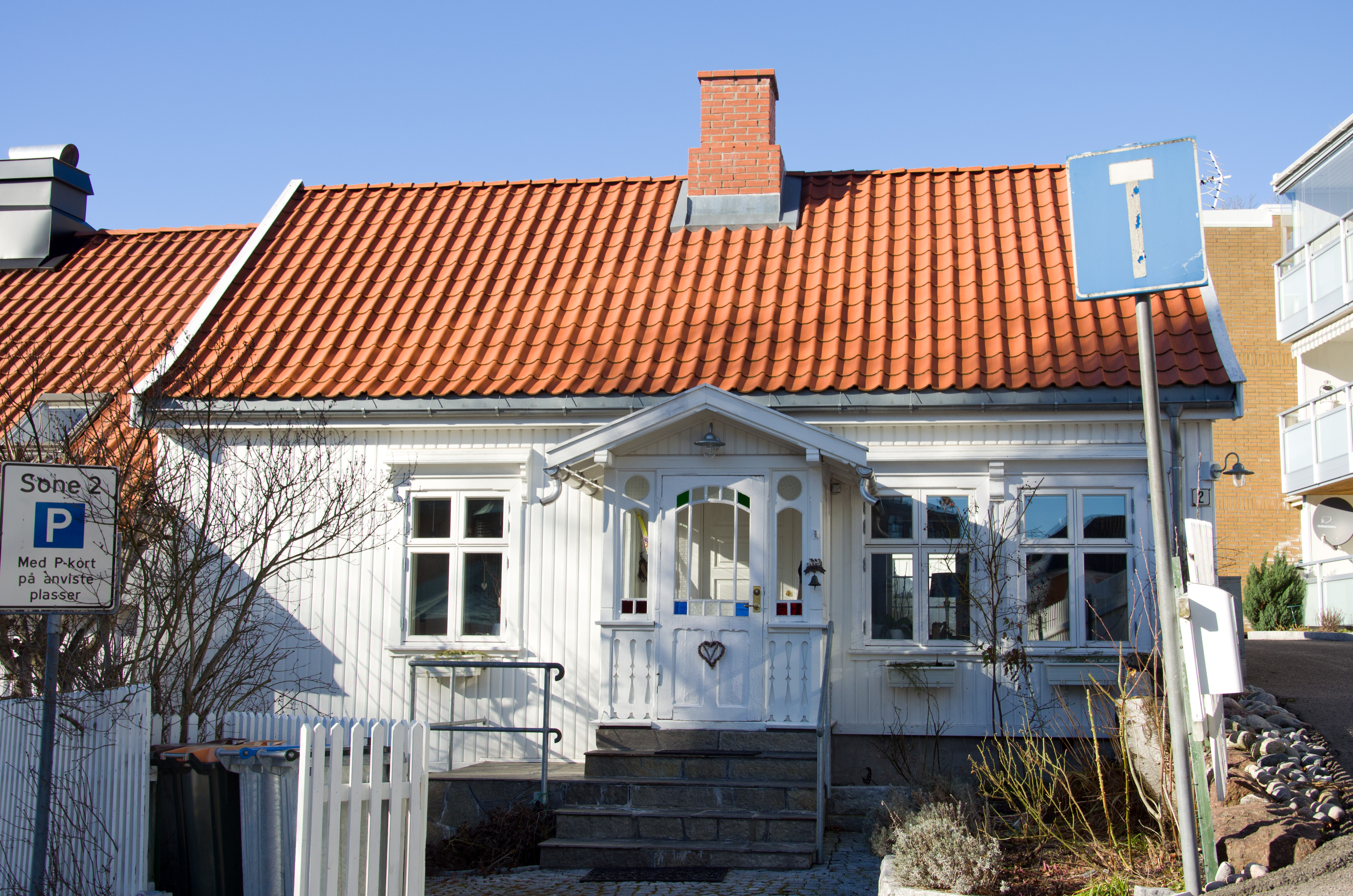 Nedre Slottsgate 2, Tønsberg. Bygget i 1882.